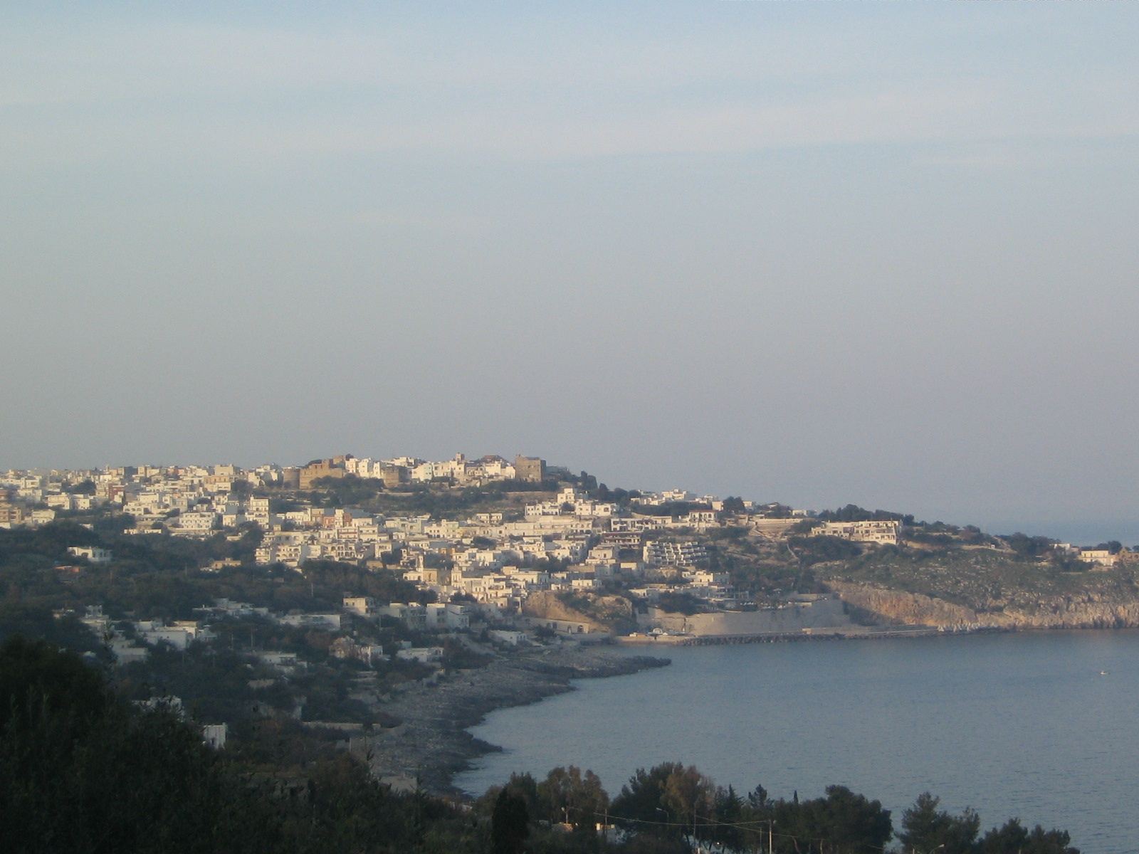 Immagine di Castro